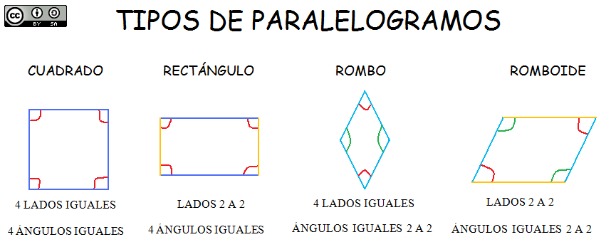 Tipos de paralelogramos. Para Educación Primaria.